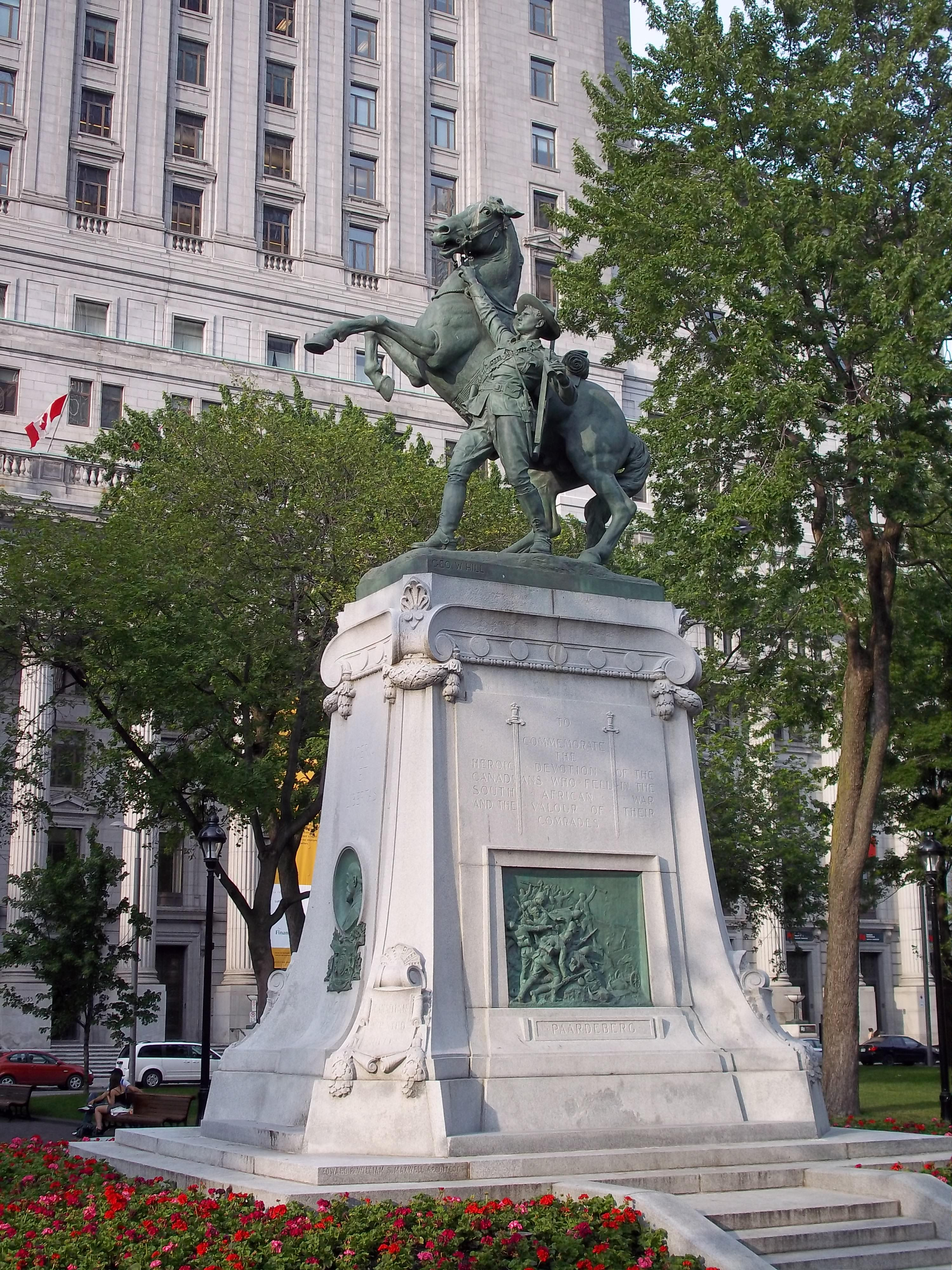 Monument aux héros de la Guerre des Boers, Square Dorchester, Montréal